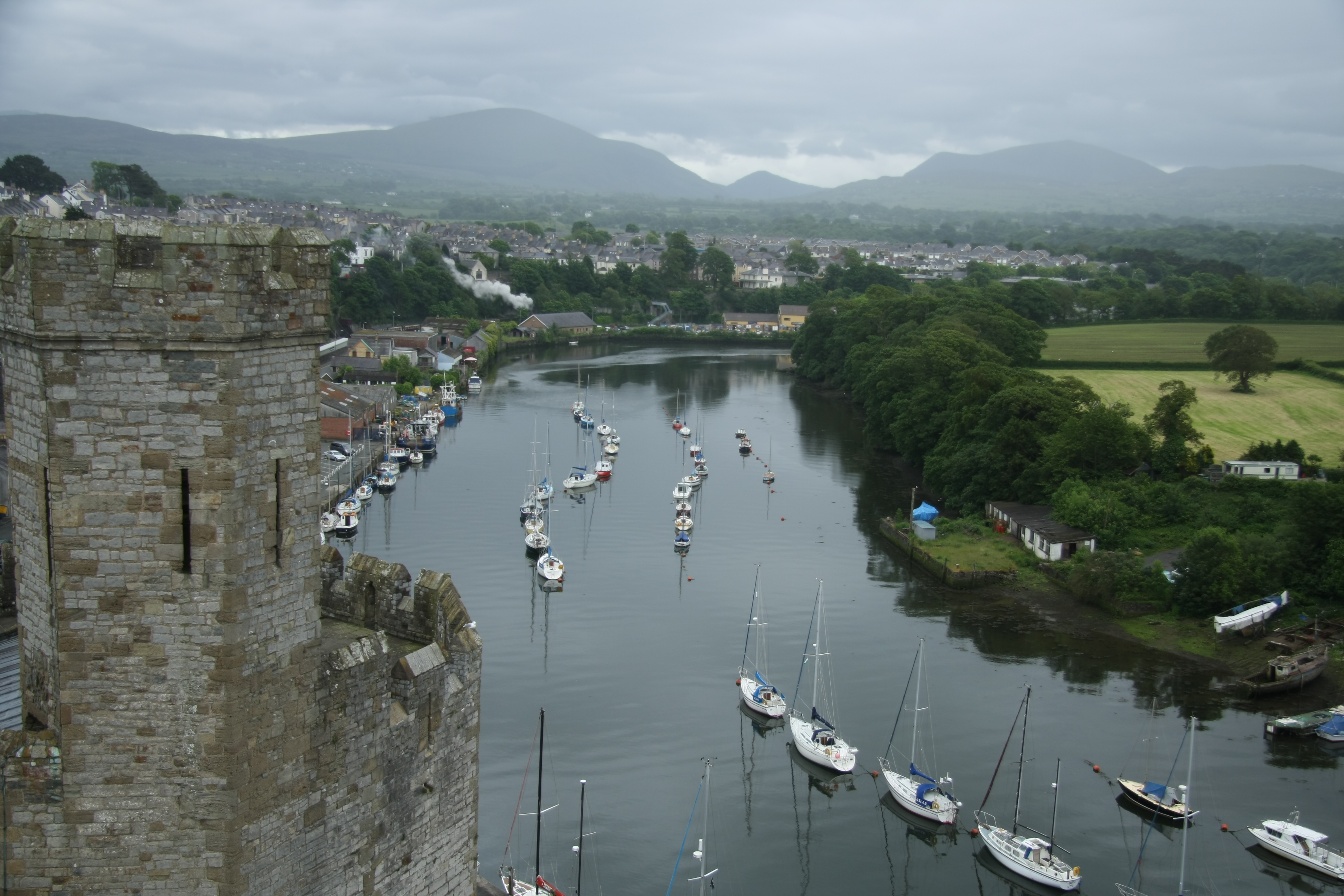 Blick von einem Turm des Caernarfon Castle den Ästuar des Afon Seiont flussaufwärts in Richtung der Berge von Snowdonia